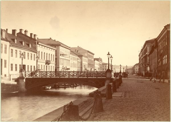 gata - avbildad Östra Hamngatan [mot söder] plats - avbildad Spannmålsgatubron